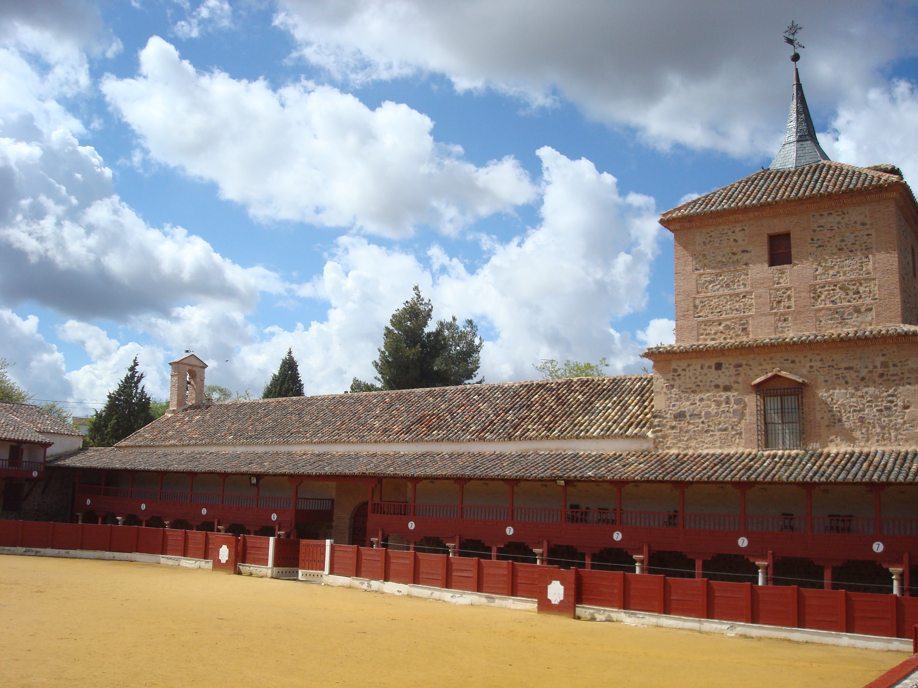 Santa Cruz de Mudela, Spain.